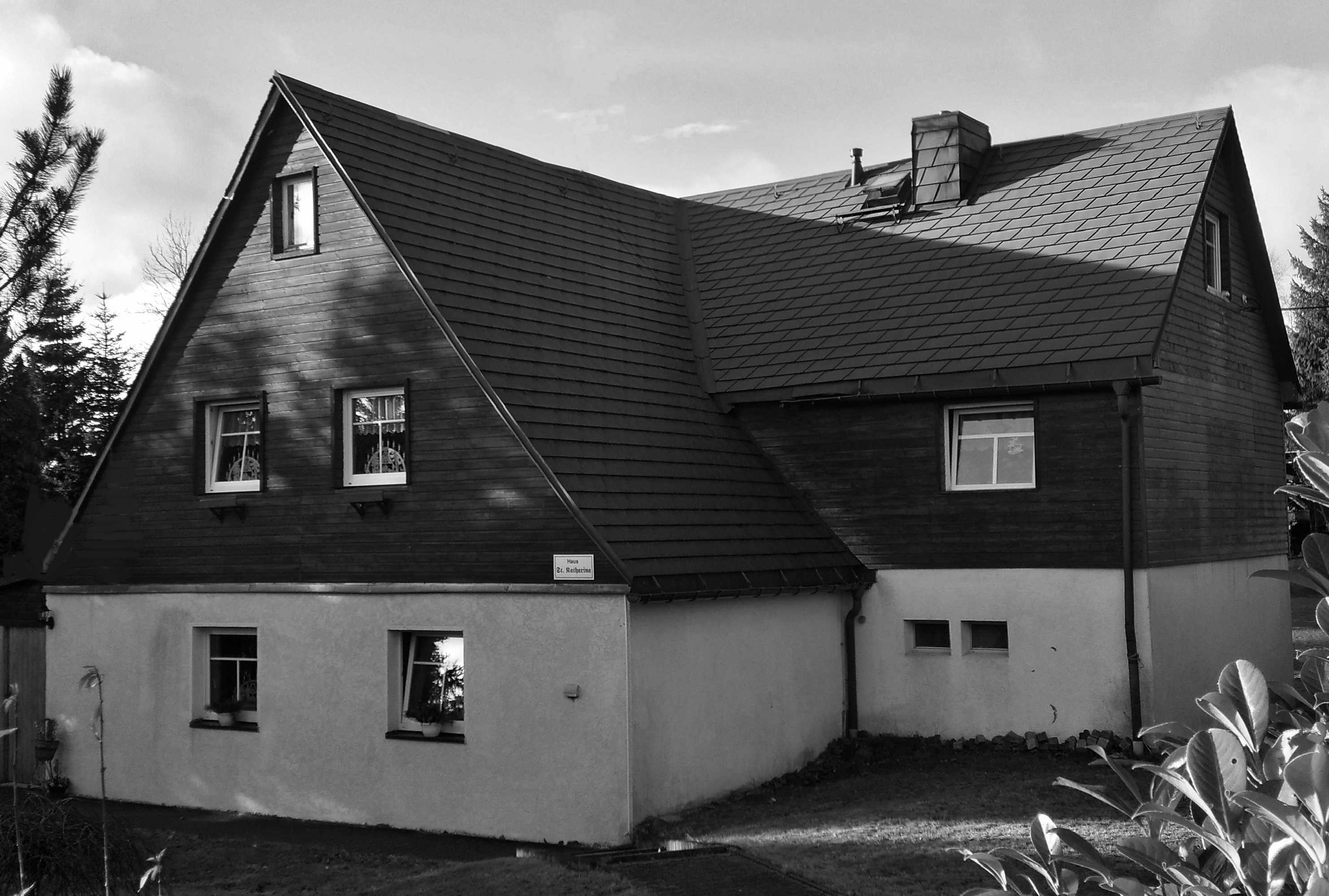 Haus St. Katharina in Johanngeorgenstadt